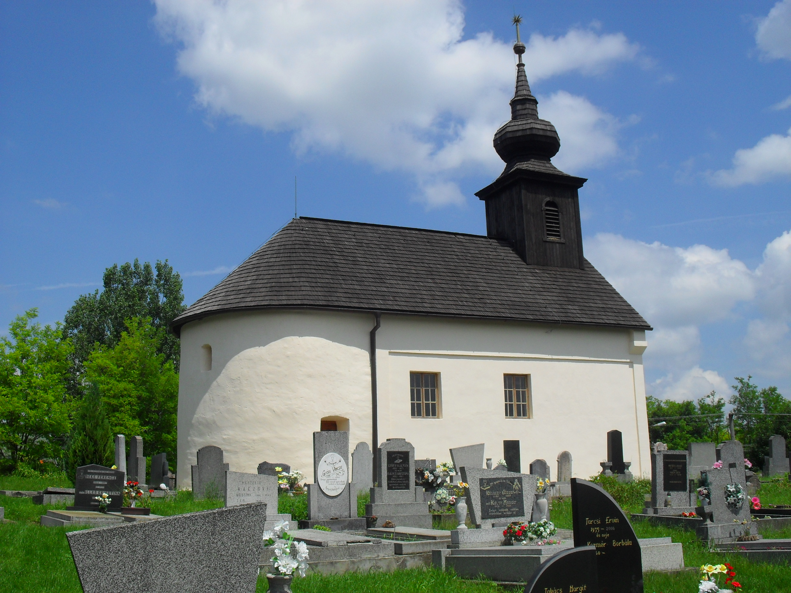 Kolozsnéma - református templom és temető